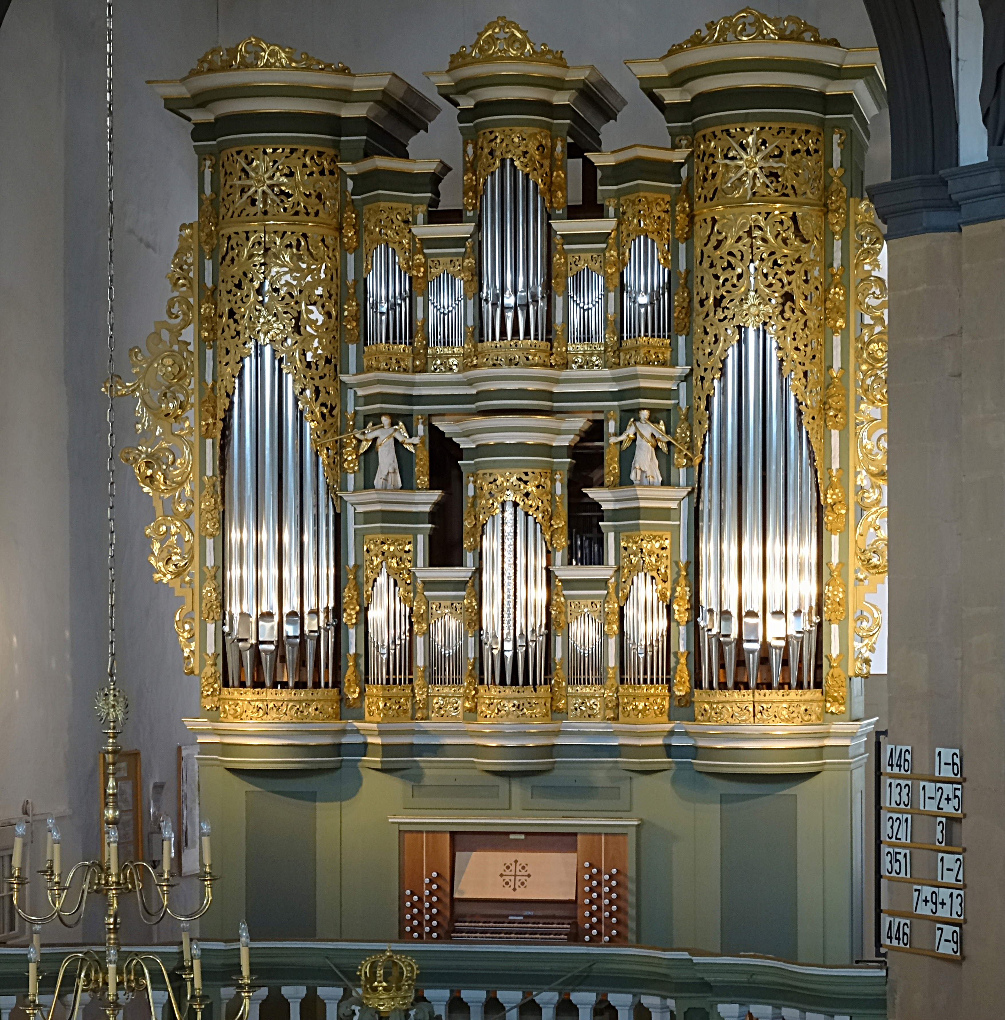 die Orgel in St. Johannis (Schleusingen) wurde 2009 durch Hey Orgelbau neu erbaut im alten Gehäuse von Nicolaus Seeber (1726)